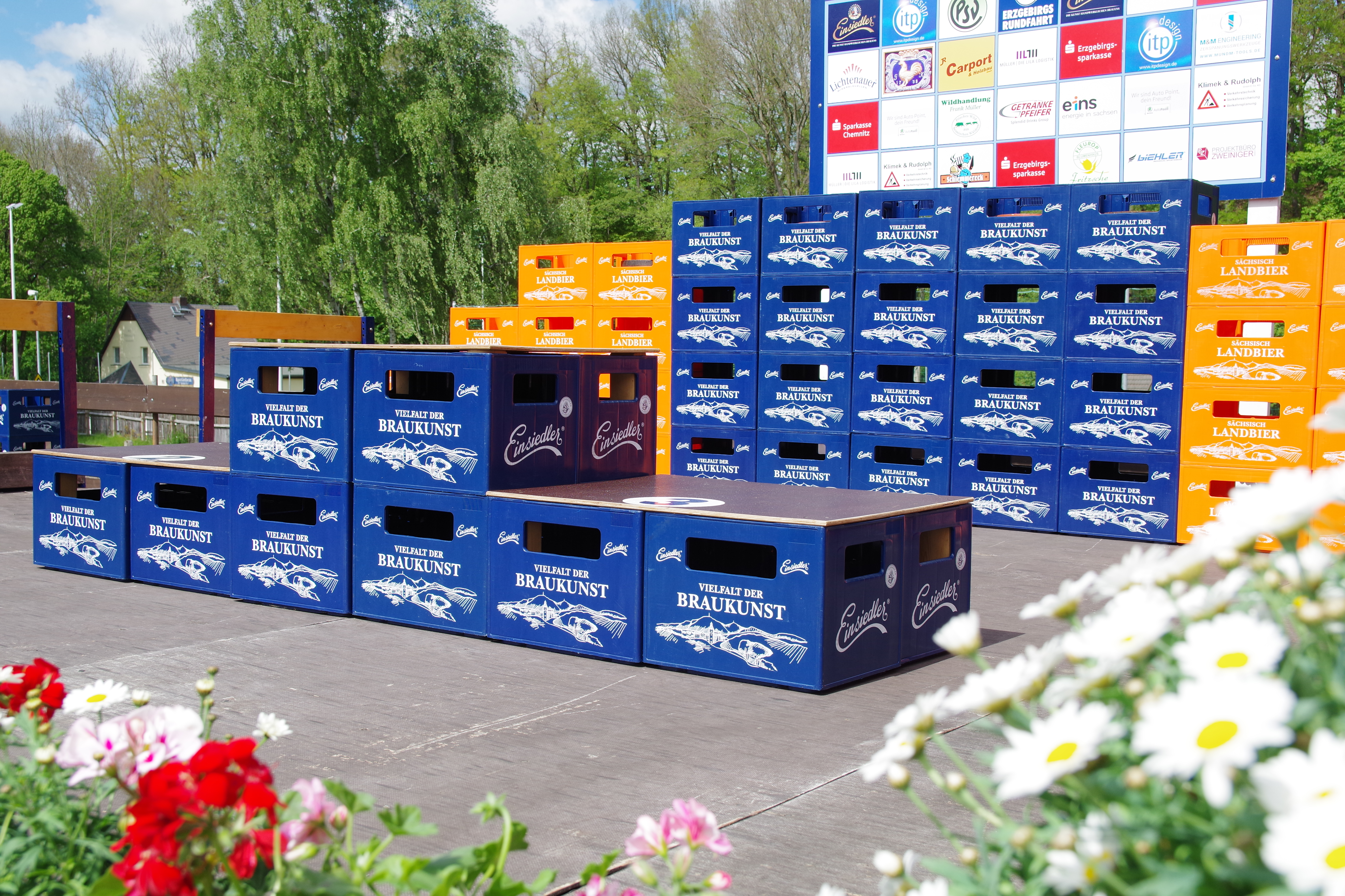 Siegerehrung der 40. Erzgebirgsrundfahrt 2019 in Chemnitz-Einsiedel Podest